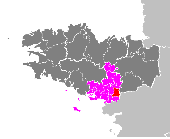 Maps of arrondissements and cantons of France: Arrondissement de Vannes - Canton d Allaire.PNG